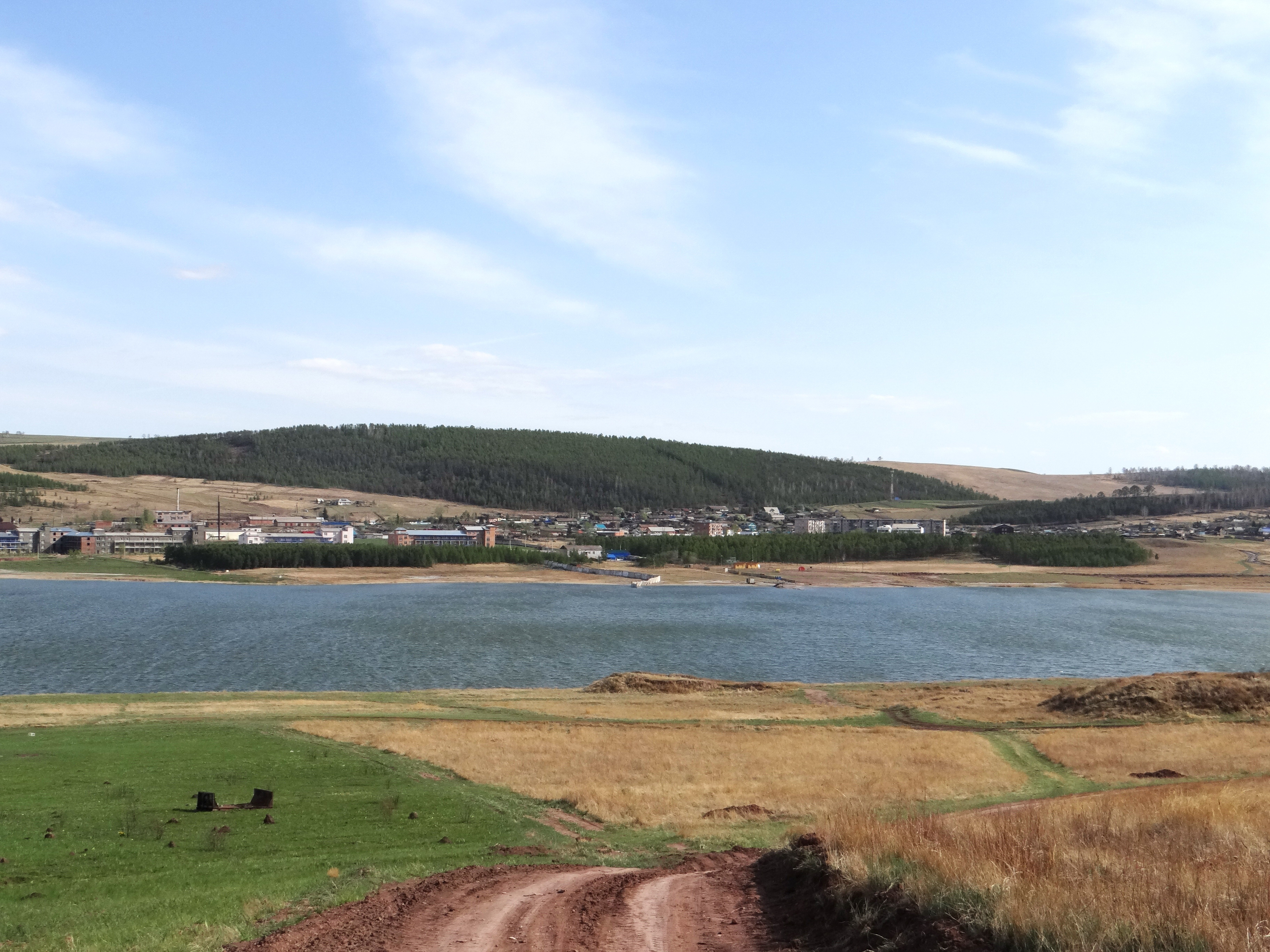 Озеро Учум: Ужурский район, Красноярский край This image is related to the protected area of Russia number 2400197